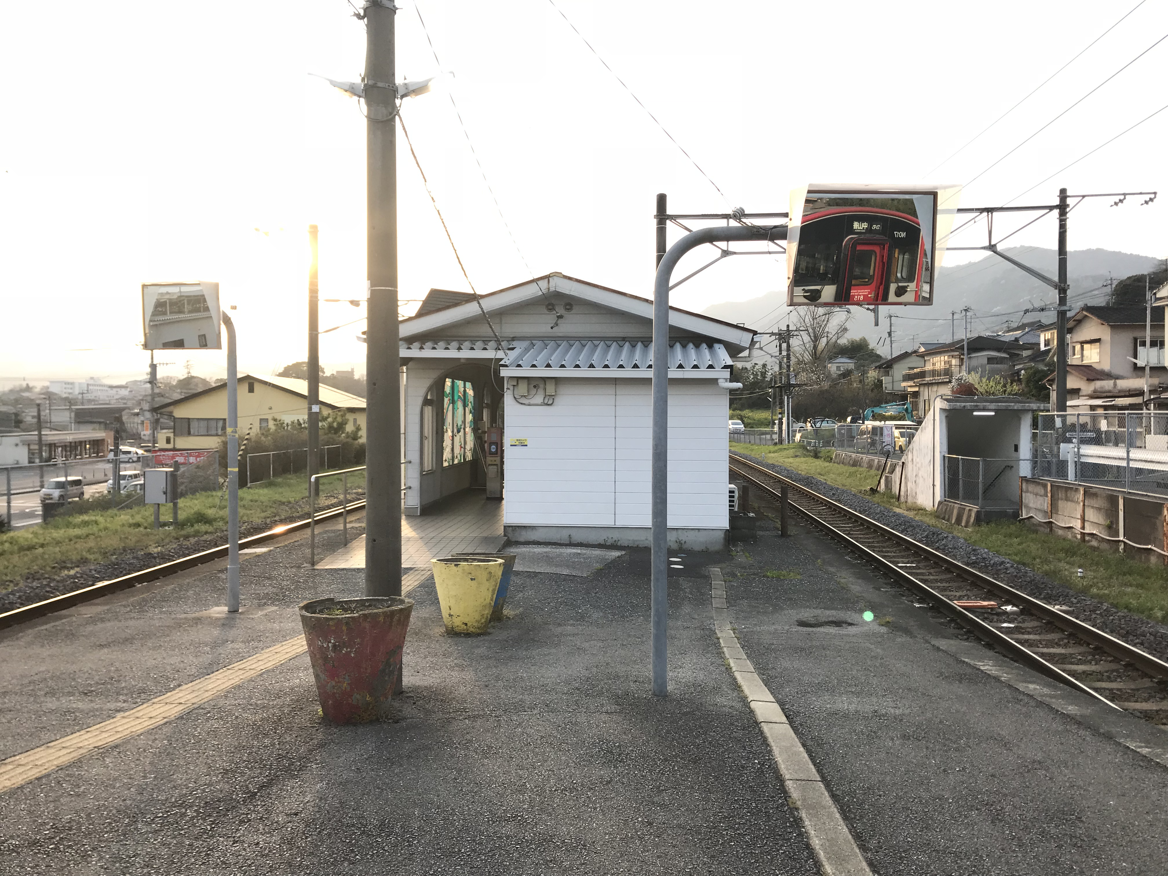 日出駅のホームと駅舎(奥は暘谷方面)